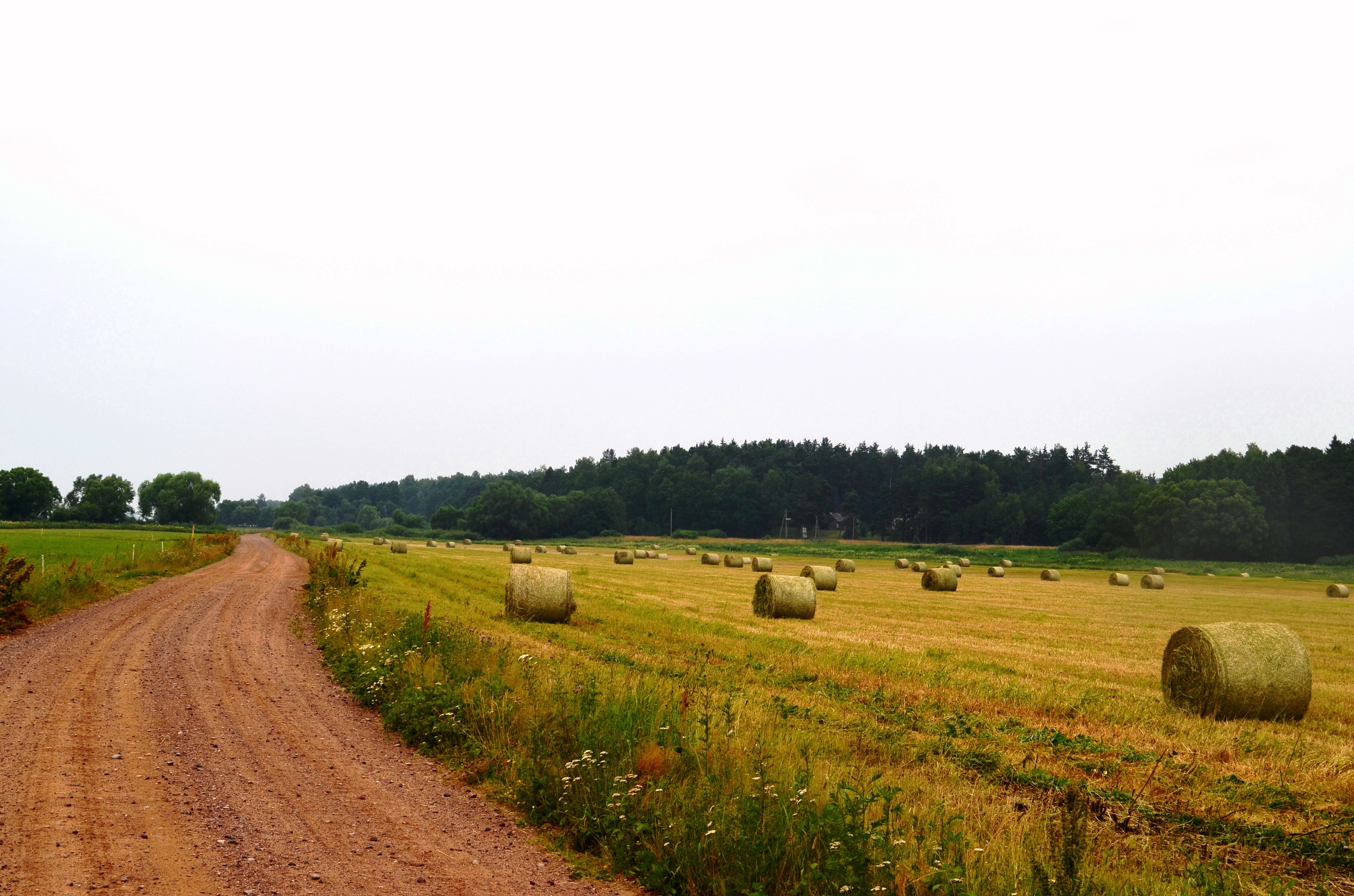 Kraštovaizdis į pietus nuo Šereitlaukio, Rambyno RP, Pagėgių sav.